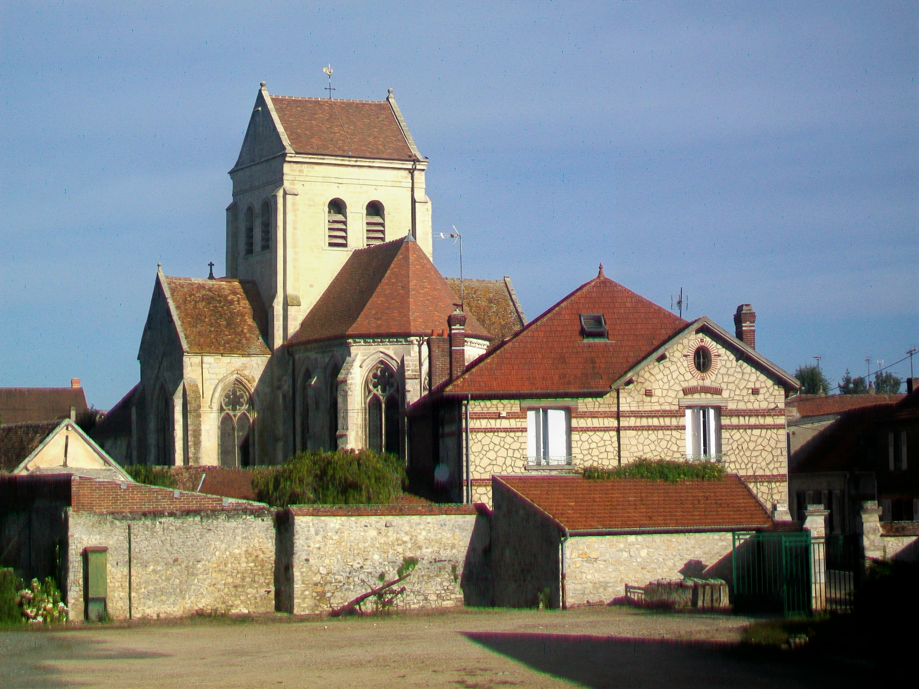 Vue depuis l'est (au premier plan, une cour de ferme).